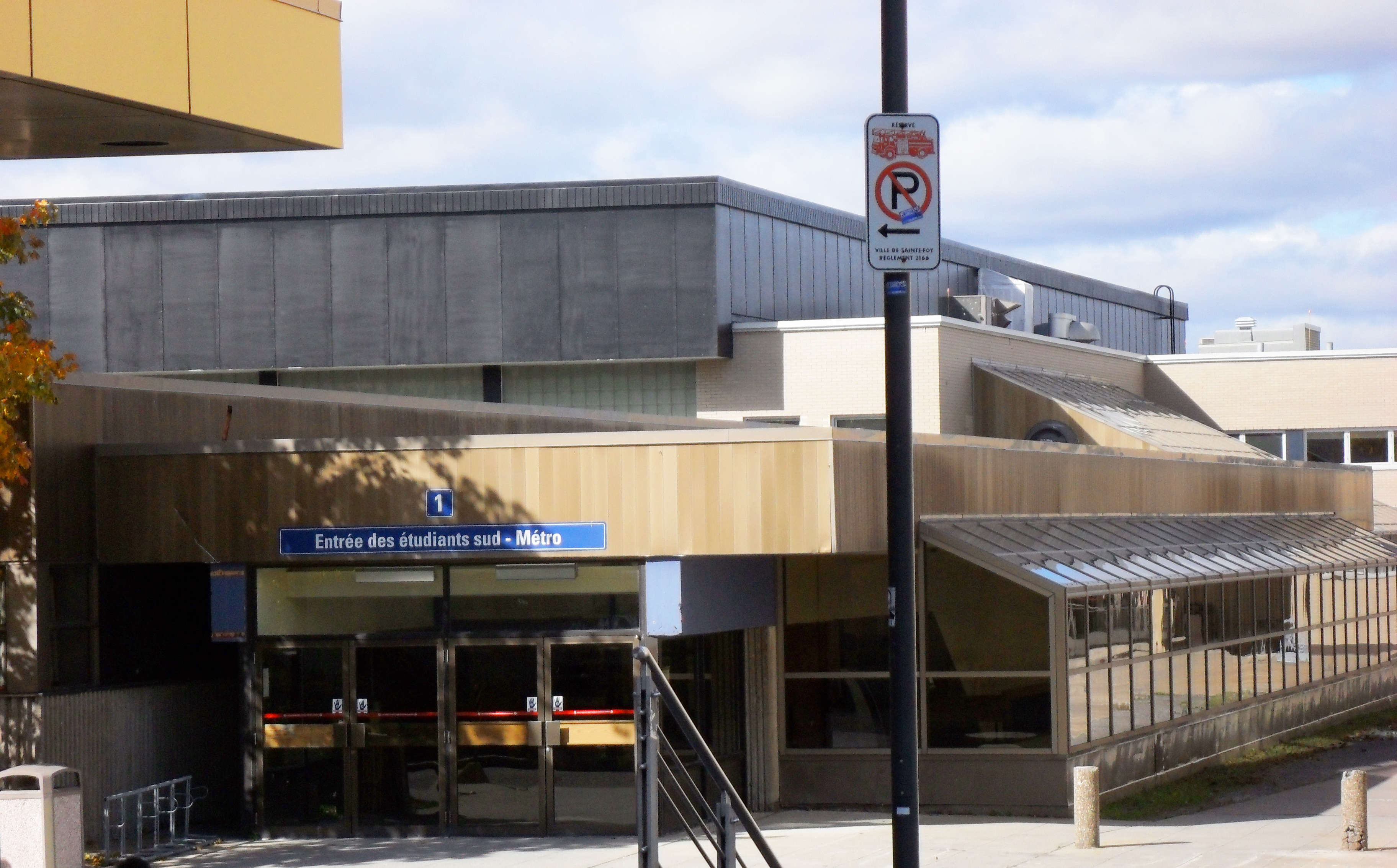 L'entrée Métro du cégep de Sainte-Foy, Québec.